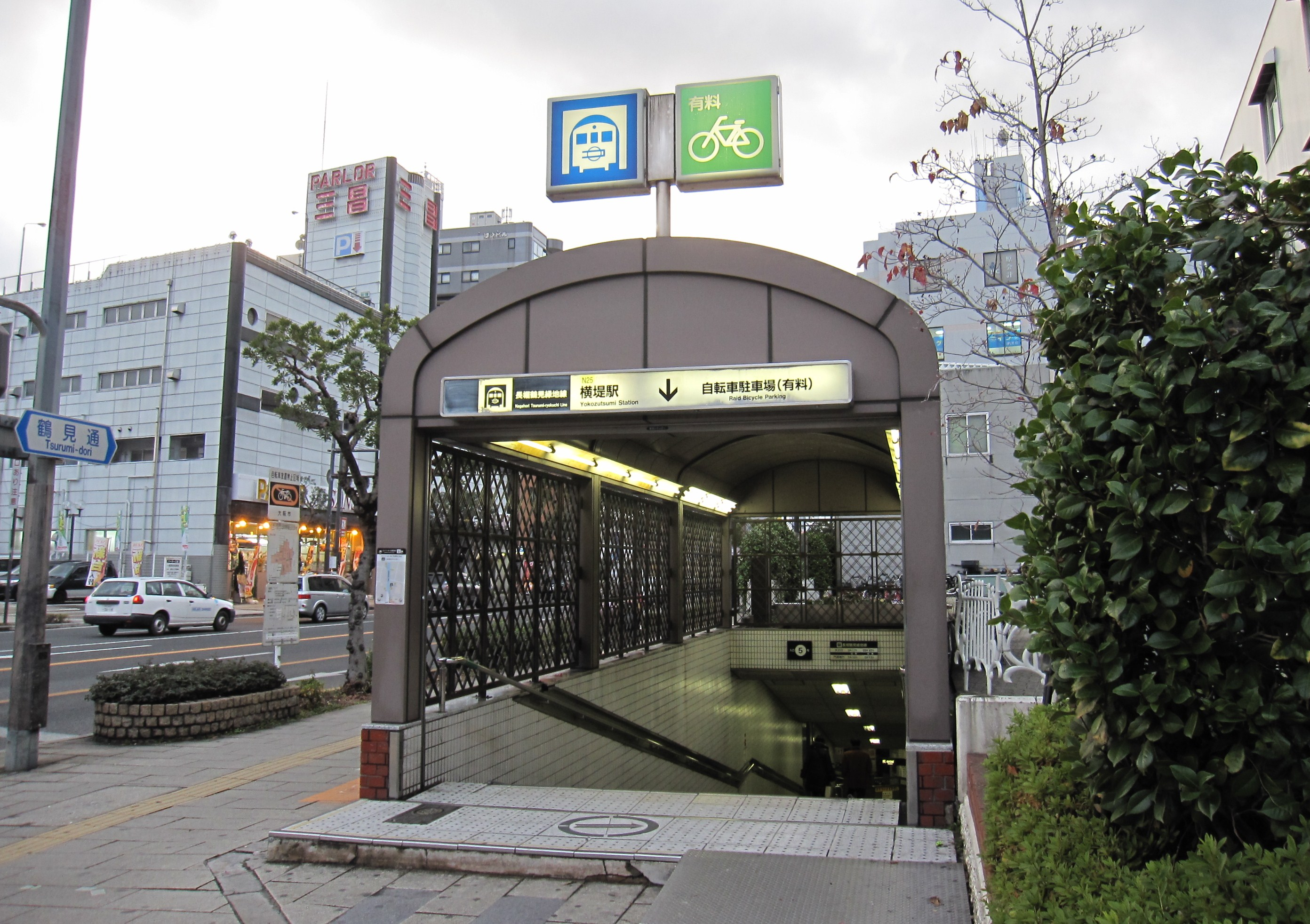 大阪市営地下鉄長堀鶴見緑地線横堤駅